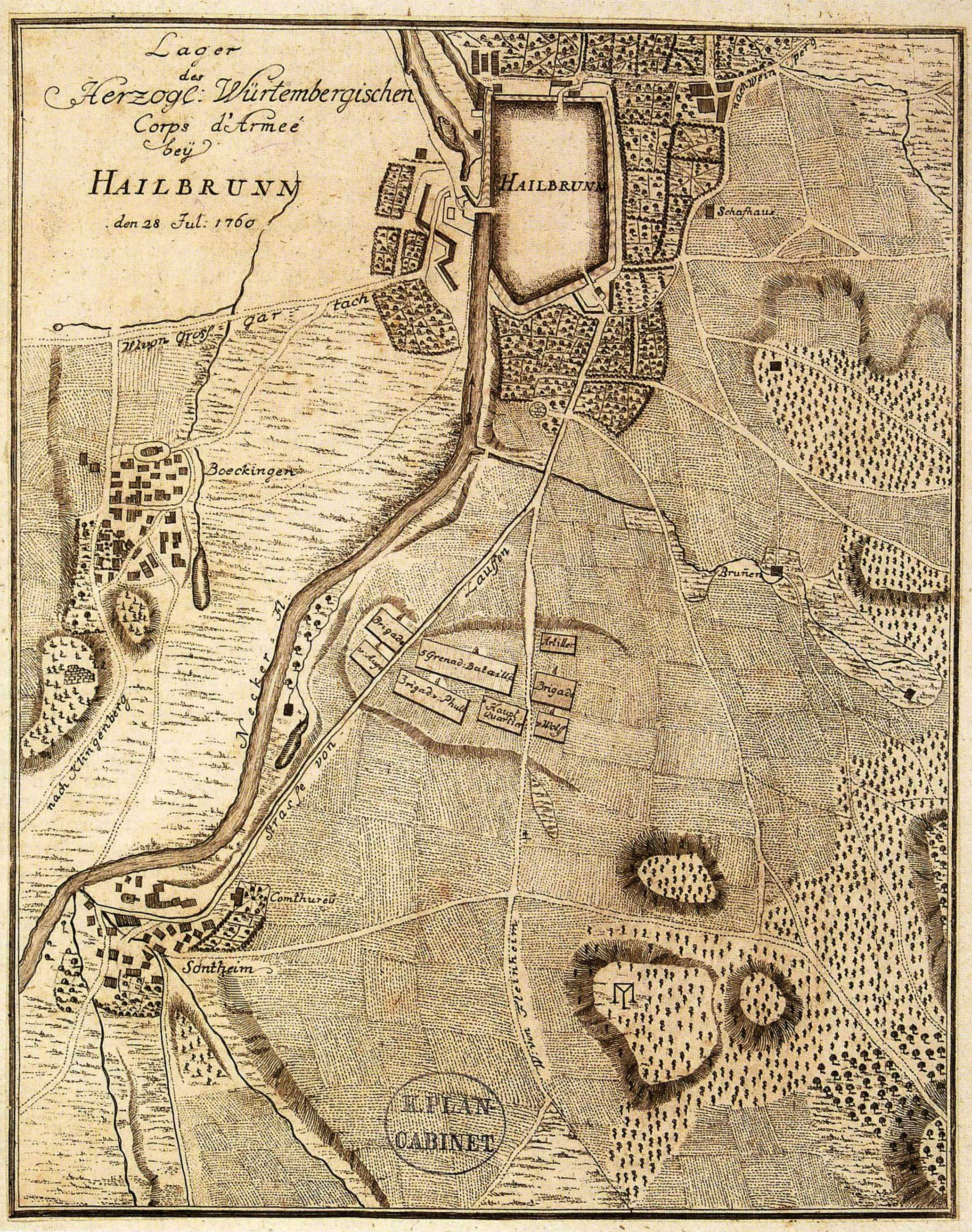 "Lager des Herzoglich Würtembergischen Corps d'Armée bey Hailbrunn den 28. Juli 1760" [aus dem Sammelband mit eingeklebten Karten des Herzoglich Württembergischen Corps des Guides über Lager während des Feldzugs gegen Preußen 1760 sowie Feldlager bei Ludwigsburg 1762 - 1763]. Landesarchiv Baden-Württemberg, Hauptstaatsarchiv Stuttgart, Bestand N 5 Nr. 37.